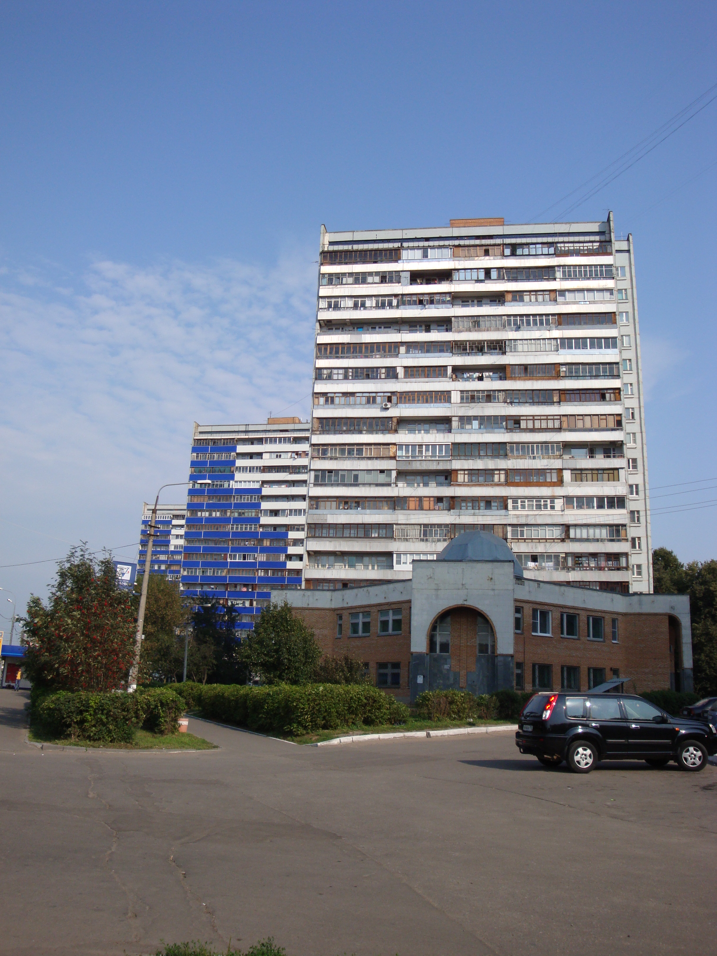 Жилые дома и станция переливания крови города Подольска (Московская область)